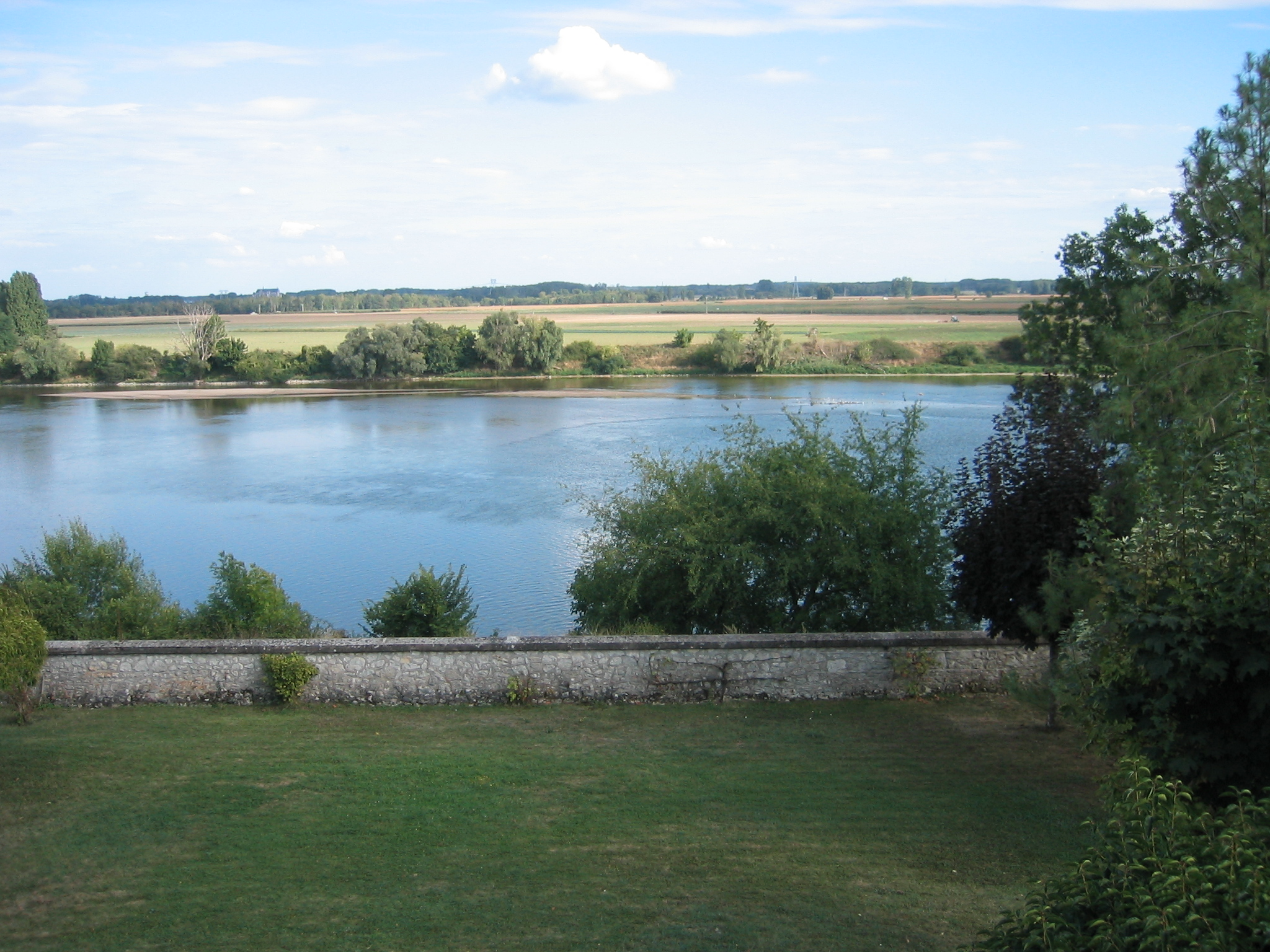 Voici la loire un jour d'été. Auteur : Timpatempo